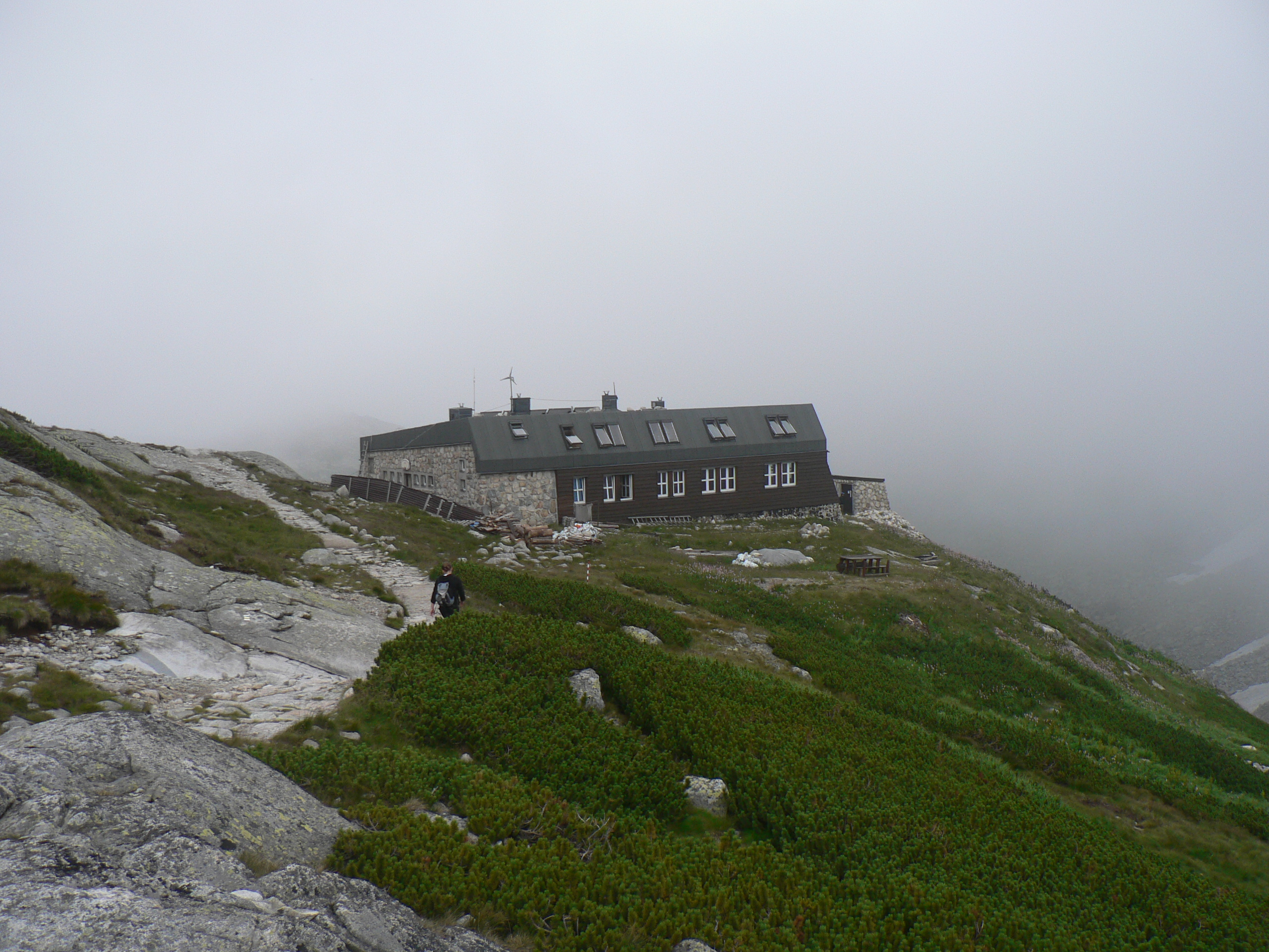 Schronisko Zbójnickie w Dolinie Staroleśnej